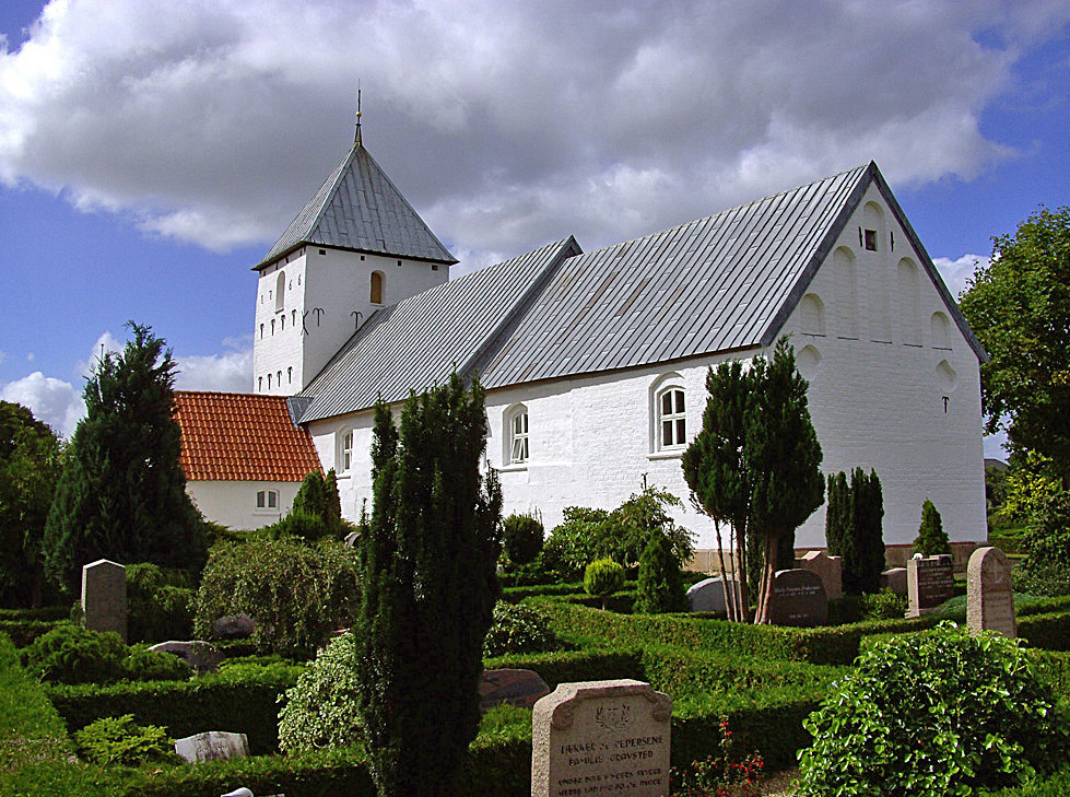 fra sydøst